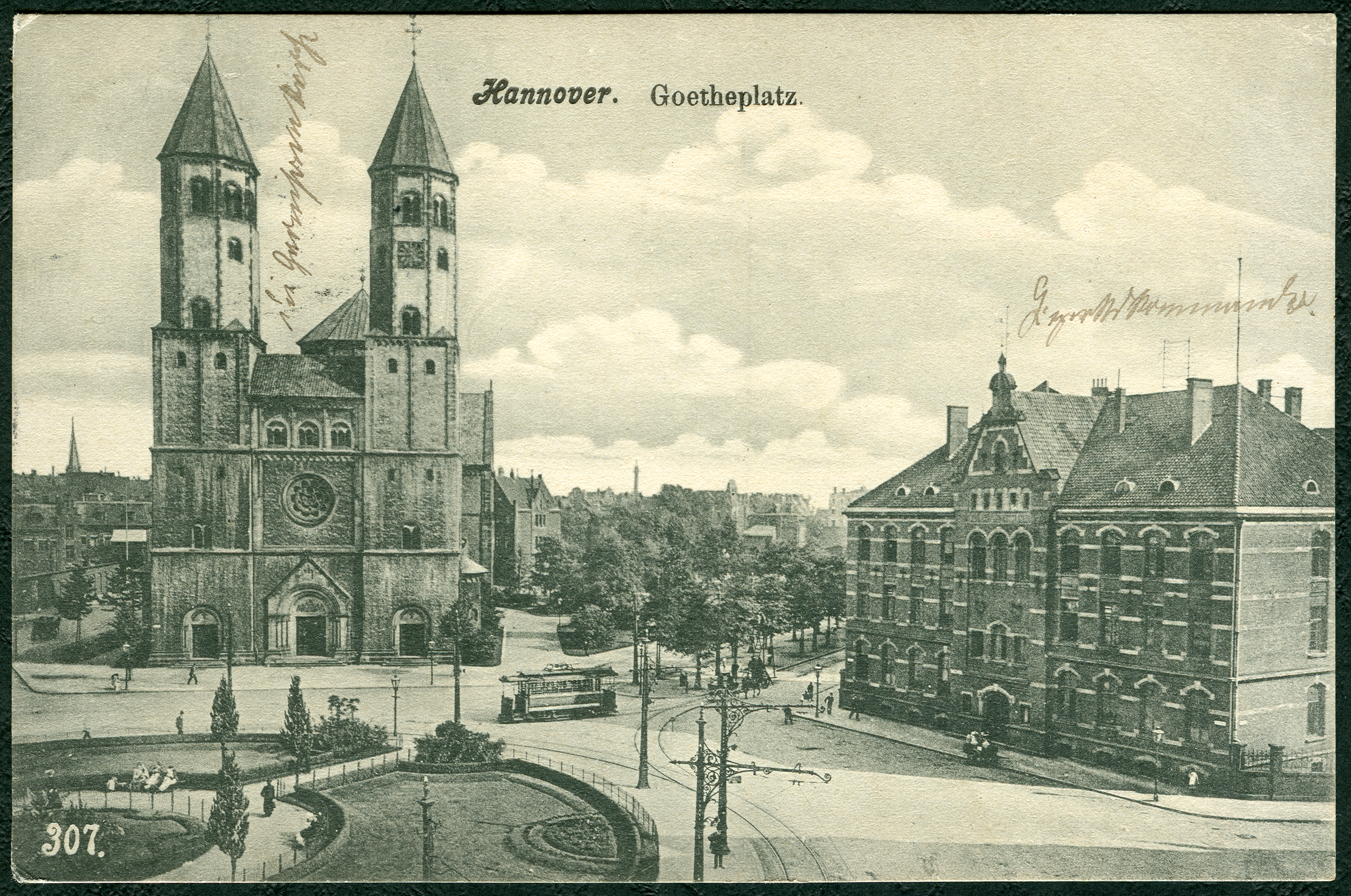 Blick über den als begehbarer Schmuckplatz ausgebauten Goetheplatz; links die erst nach dem Zweiten Weltkrieg abgebrochene Garnisonkirche, davor biegt eine Straßenbahn aus der Humboldtstraße in den Platz ein. Das Gebäude des Bezirkskommandos rechts ist heute durch einen Neubau ersetzt.